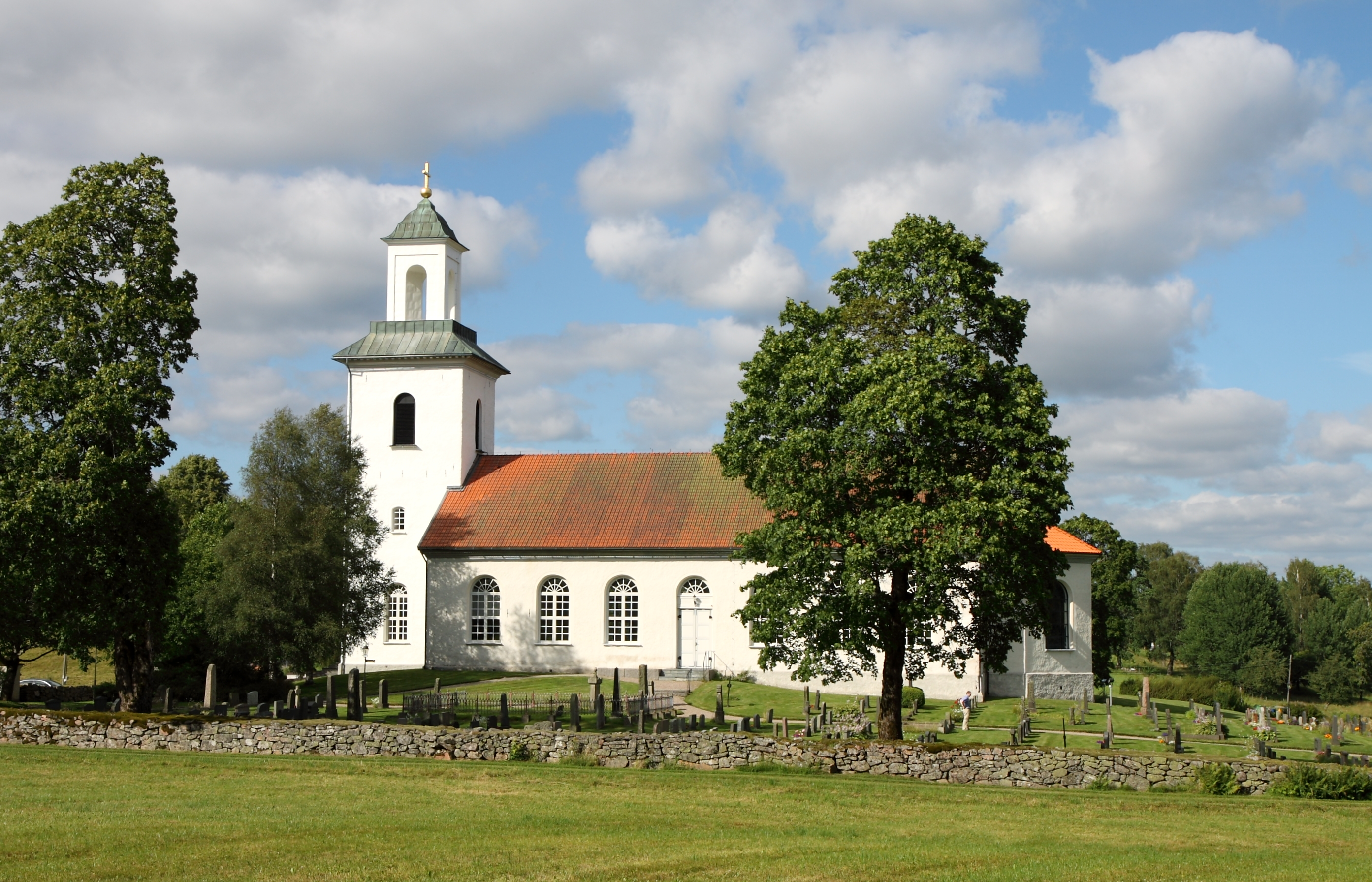 Tvärreds kyrka.